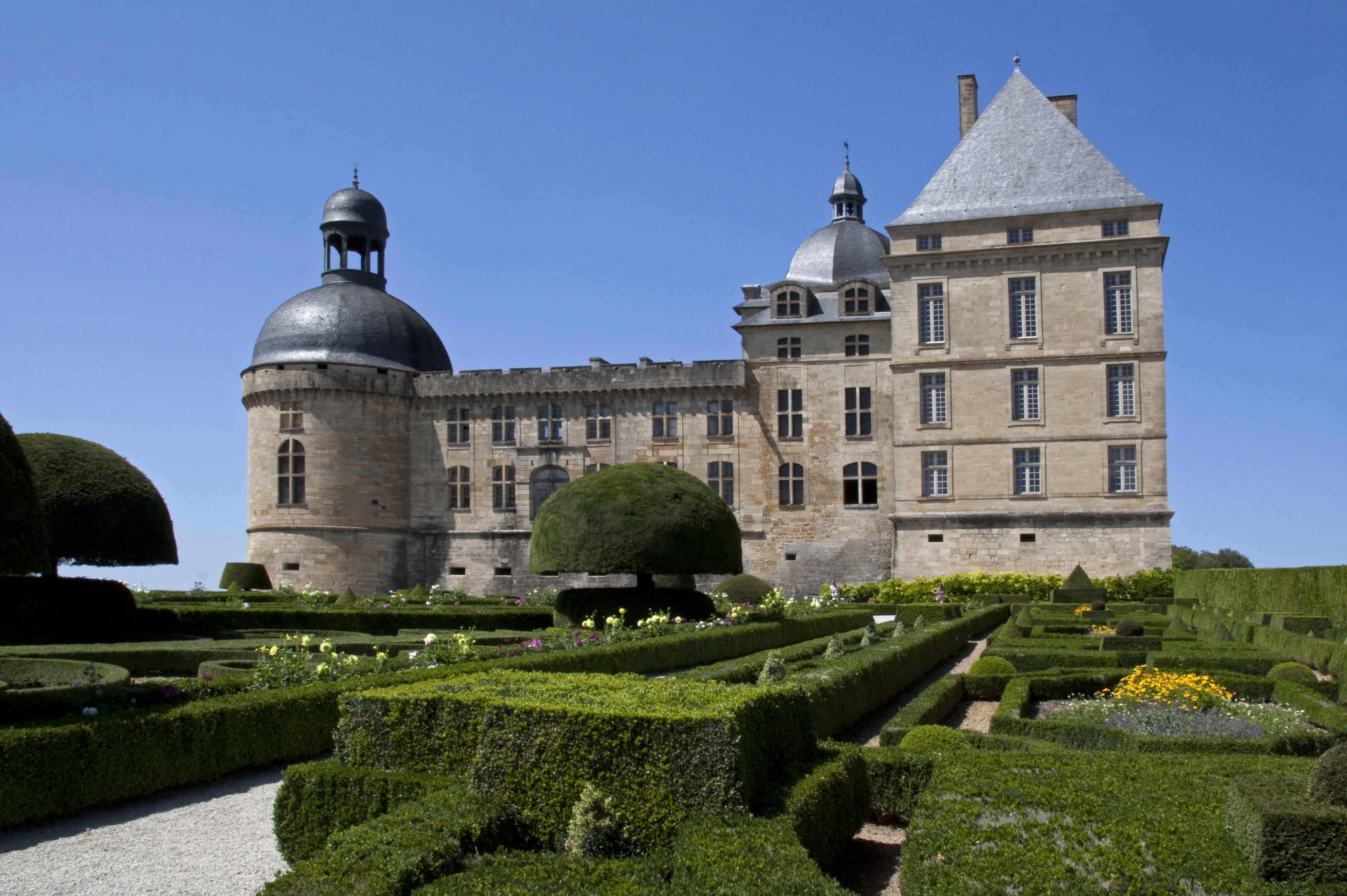 Schloss Hautefort und Teile seines Barockgartens